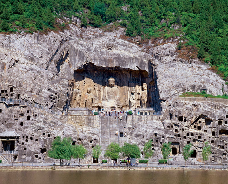 龙门奉先寺